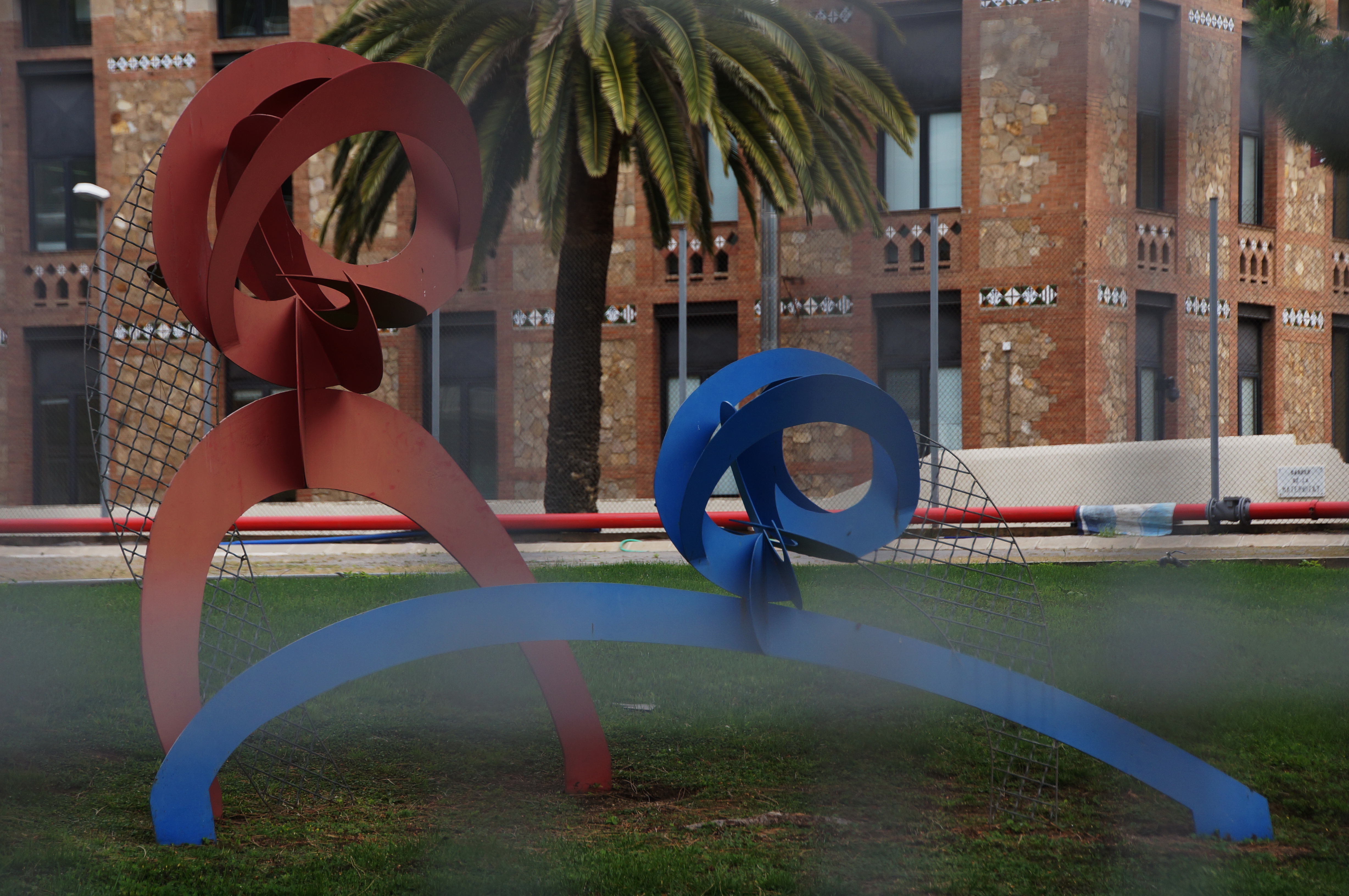 Òrbites centenàries (Montserrat Sastre). Museu Futbol Club Barcelona President Nuñez (Barcelona)